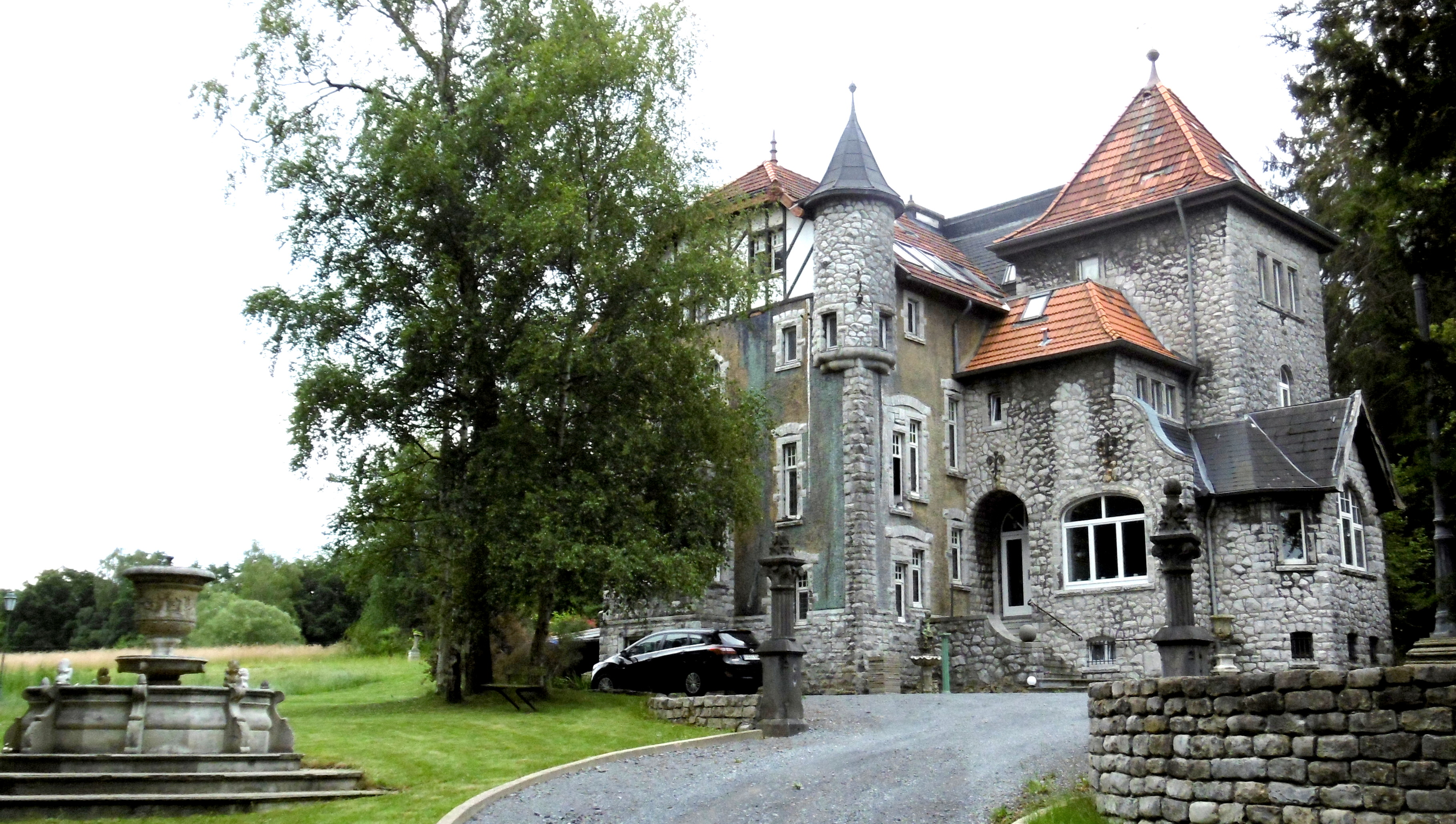 Haus Gostert 102, Atelier Ramírez in Hauset/Belgien